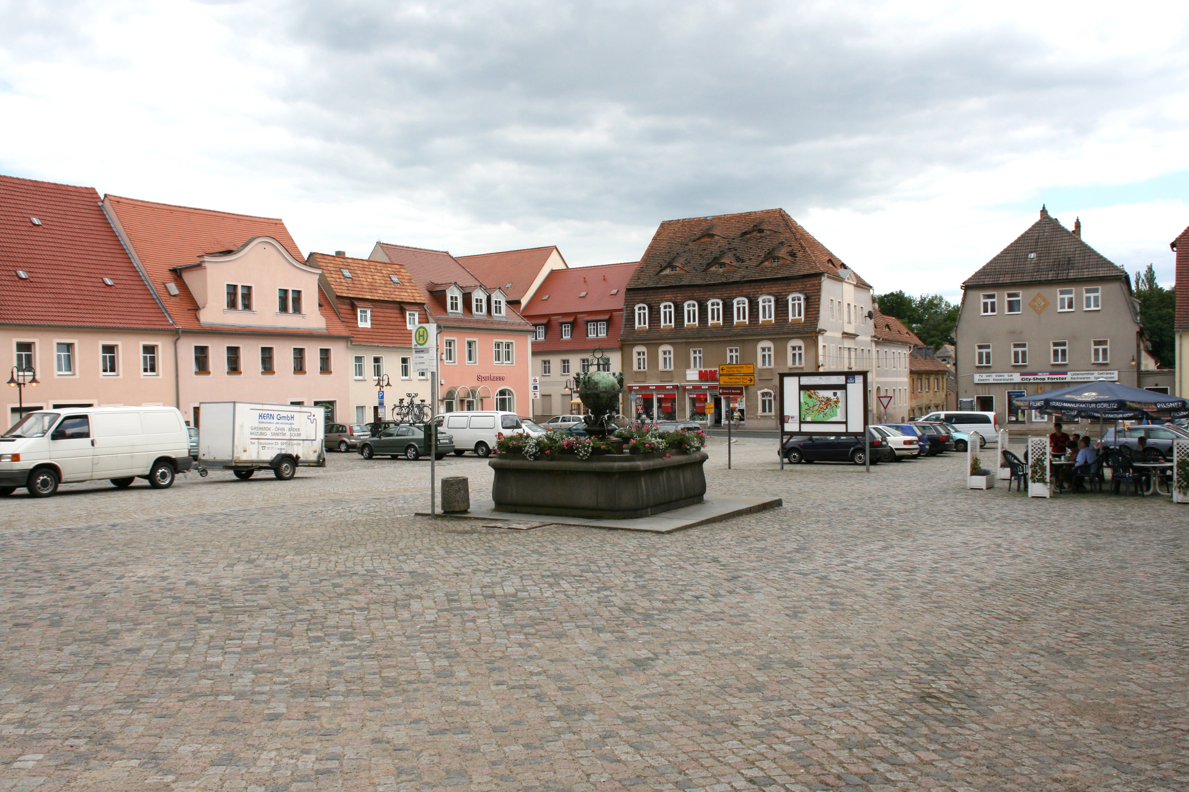 Marktplatz an Bautzener Straße / Görlitzer Straße in Bernstadt a. d. Eigen